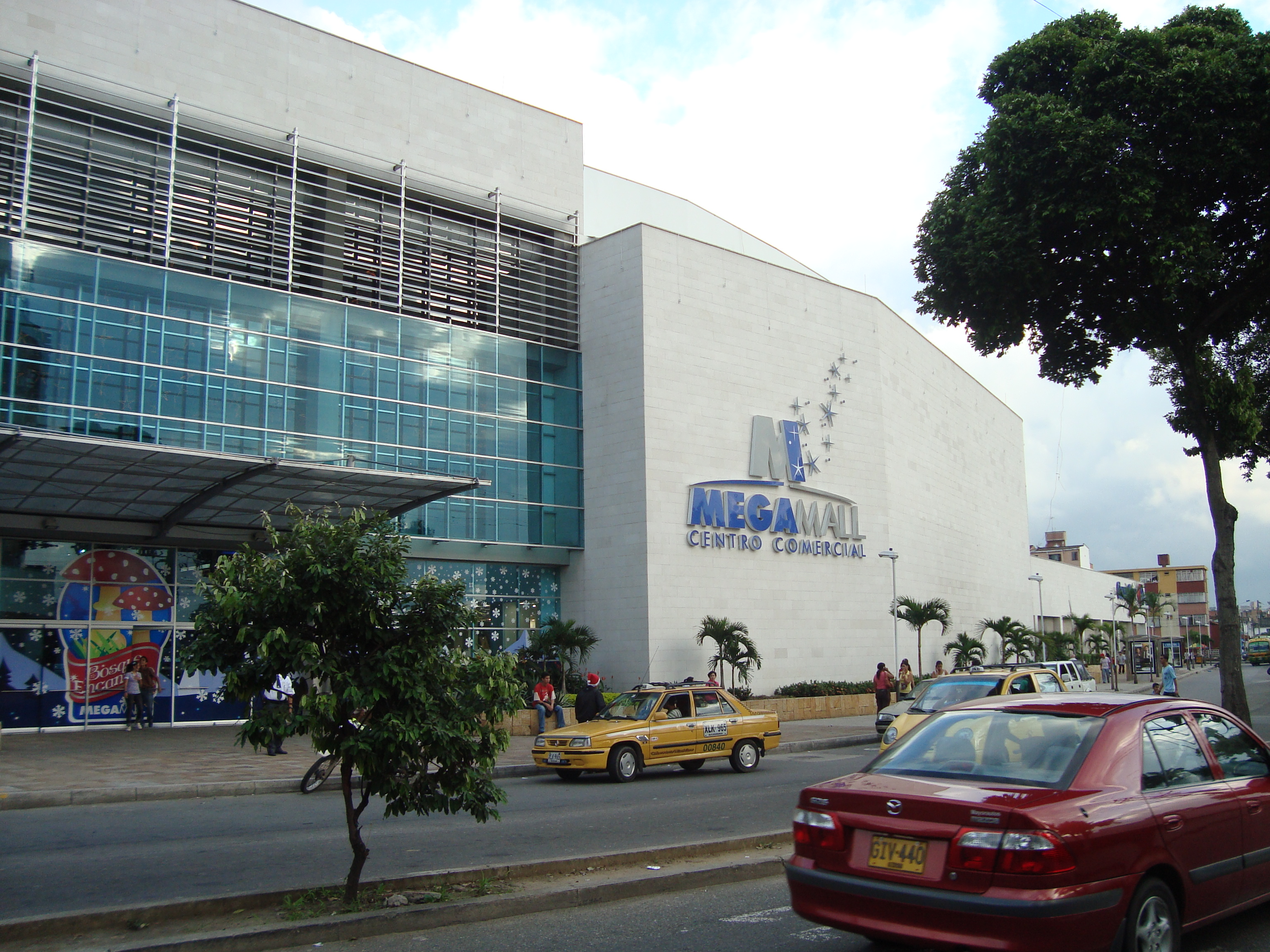 Megamall (centro comercial) - Bucaramanga, Colombia